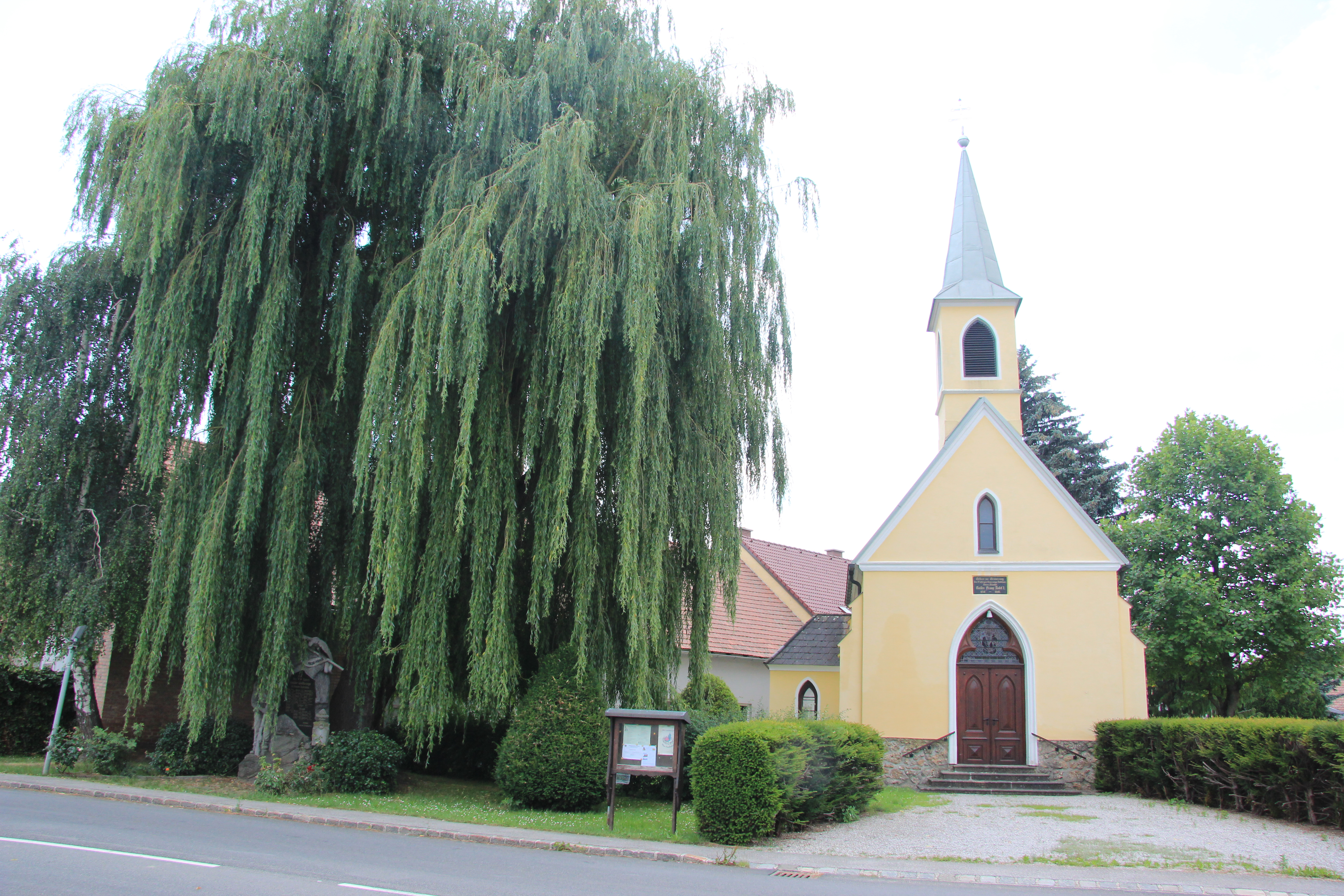 Ortskapelle und Kriegerdenkmal in Natschbach, Bezirk Neunkirchen